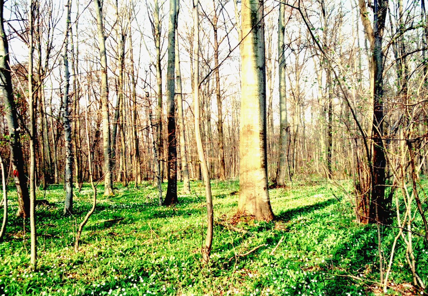 Buchen-Plenterwald im Mühlhäuser Stadtwald, Frühjahrsaspekt. Eigene Fotografie im April 2004.